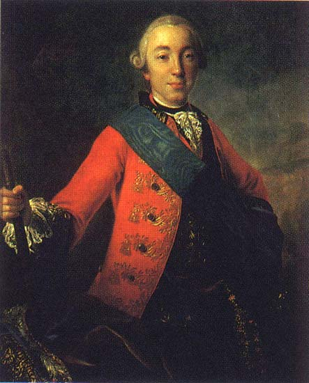 Портрет великого князя Петра Федоровича Portrait of the Grand Duke Peter Fyodorovich Неизвестный автор Не позднее 1758 Холст, масло. 114 х 90 На обороте черным: 4372. На подрамнике черным надпись: Импер. Петръ III Пис. Гр. Ротари (Ротари зачеркнуто карандашом); надпись карандашом: Рокотов. Поступила: 1905 из ИЭ* Ж-4938 Изображен в мундире генерала Голштинских войск с орденом святого Андрея Первозванного (лента). Вариант - ГТГ [Государственная Третьяковская галерея. Москва]; копия работы К. И. Головачевского (1758) - Павловский дворец-музей (ГМЗ „Павловск"**).